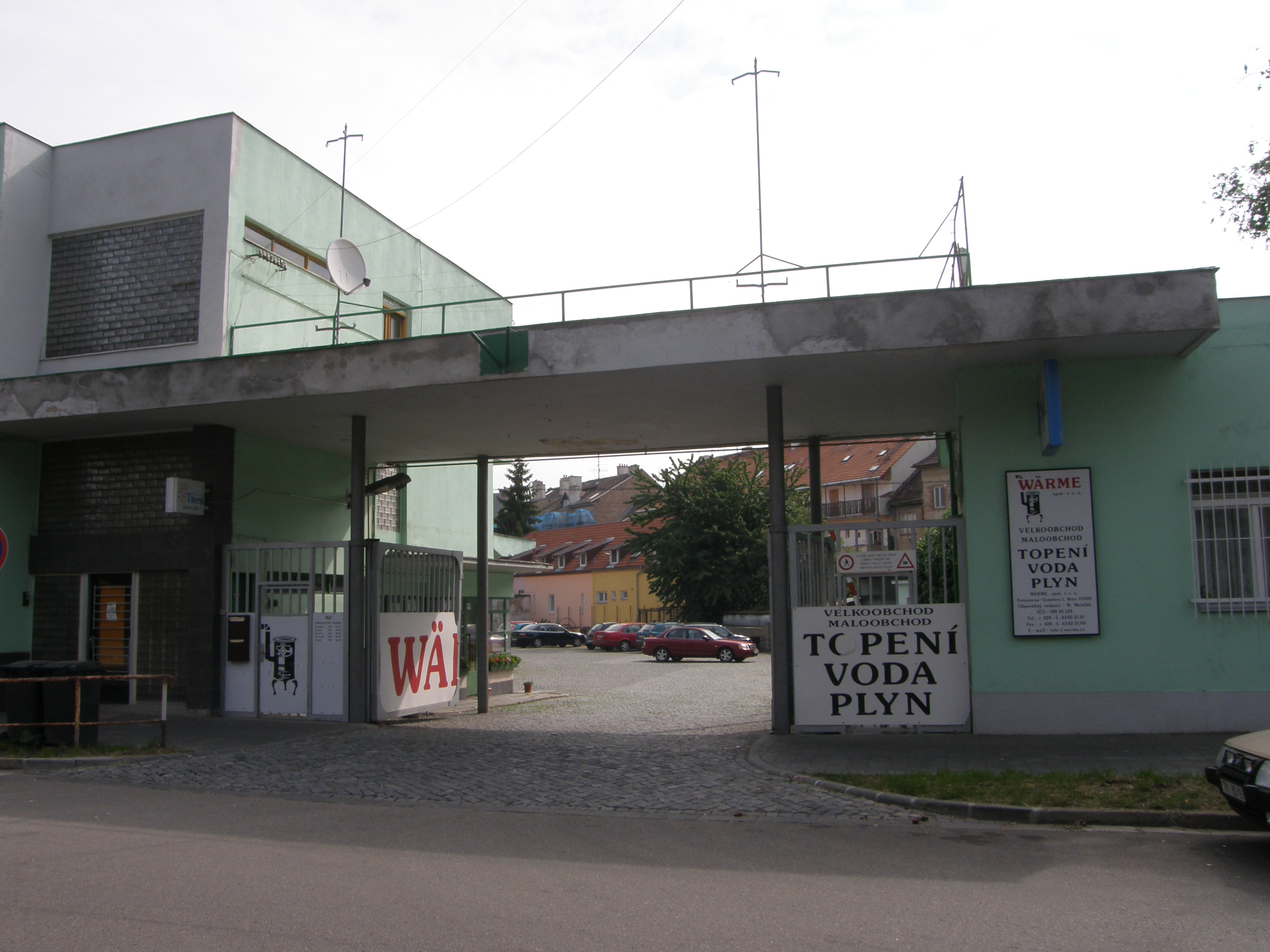 Garáže Grmelova